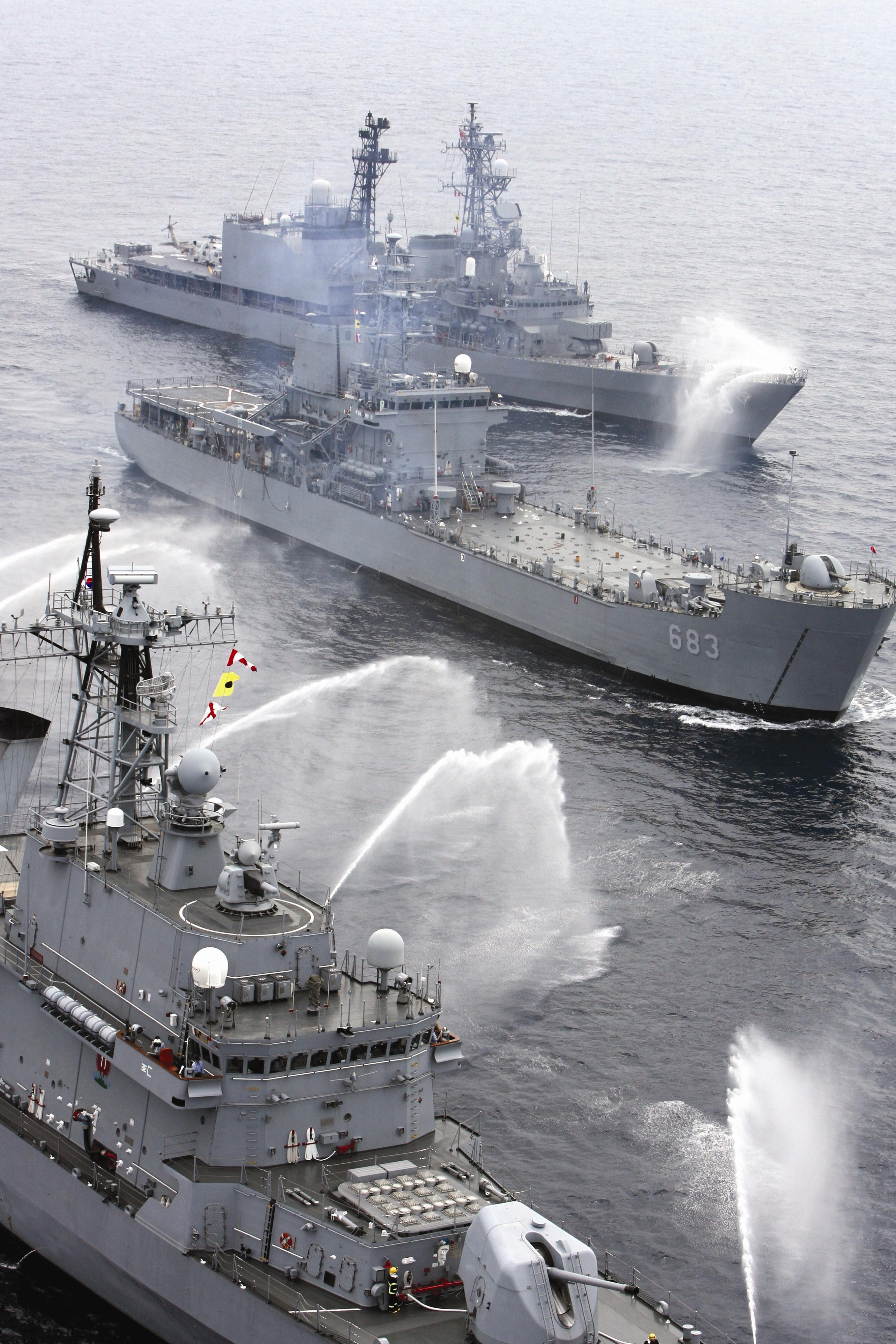 한국해군과 일본 해상자위대의 `한.일 수색 및 구조훈련'이 20일 제주도 동북방 해상에서 실시돼 양국 함정이 조난 선박에 대한 소화방수 훈련을 하고 있다. 이번 훈련은 지난 99년에 최초로 실시한 이래 이번이 5번째로 해상사고 발생시 한.일간의 공동 대처능력 향사에 기여할 것으로 기대된다.